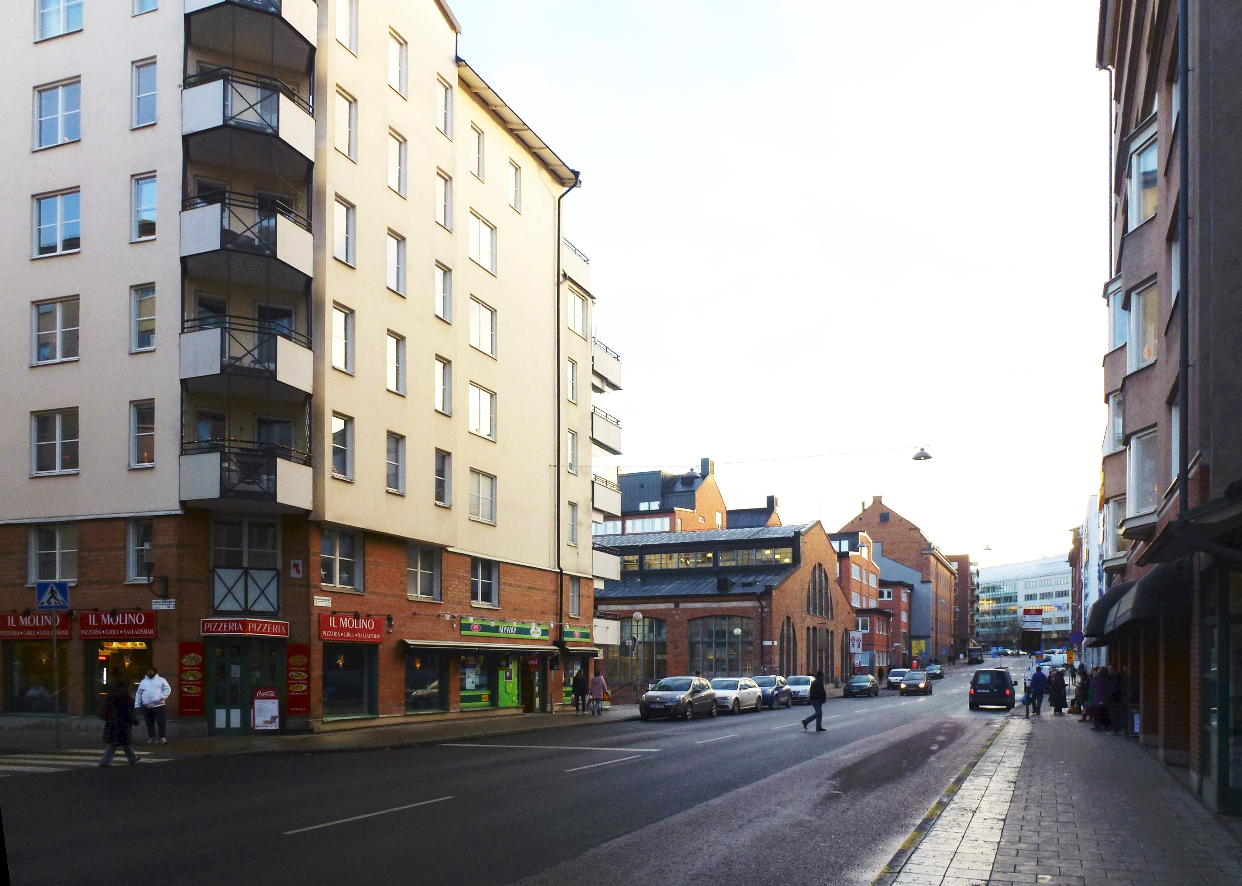 Rosenlungsgatan södra del